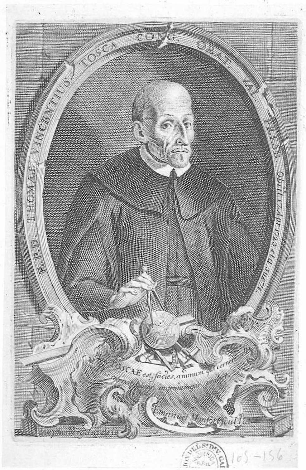 Retrato de Tomás Vicente Tosca grabado por Manuel Monfort por dibujo de José Vergara. Ilustración de "Compendio mathematico...", Madrid, 1757. Biblioteca Nacional de España.